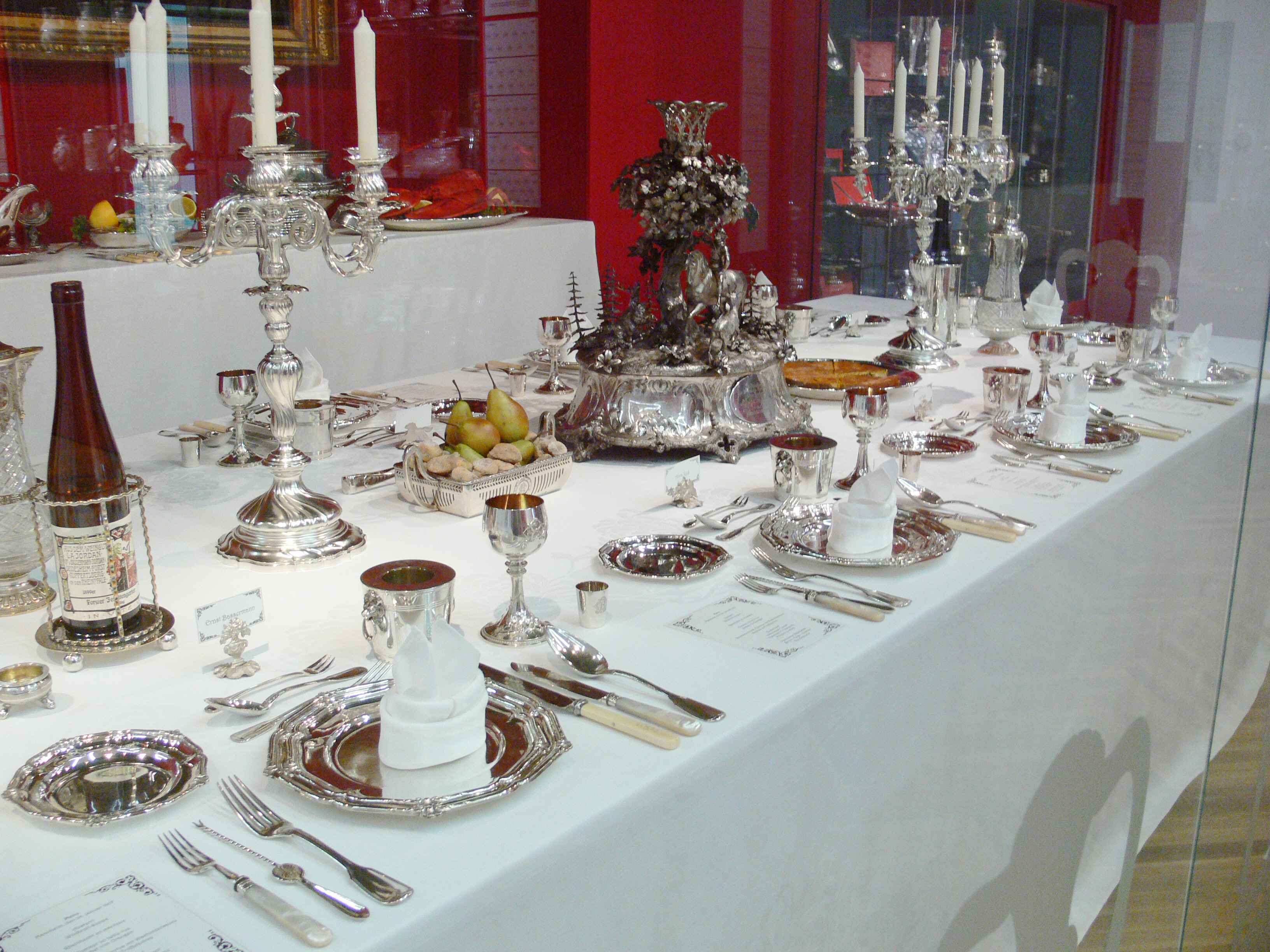 Silbertafel der Geschwister Carl und Anna Reiß, c. 1000 pieces, various German manufacturers, after 1888 Gallery: Zeughaus, Reiss-Engelhorn-Museen, Mannheim